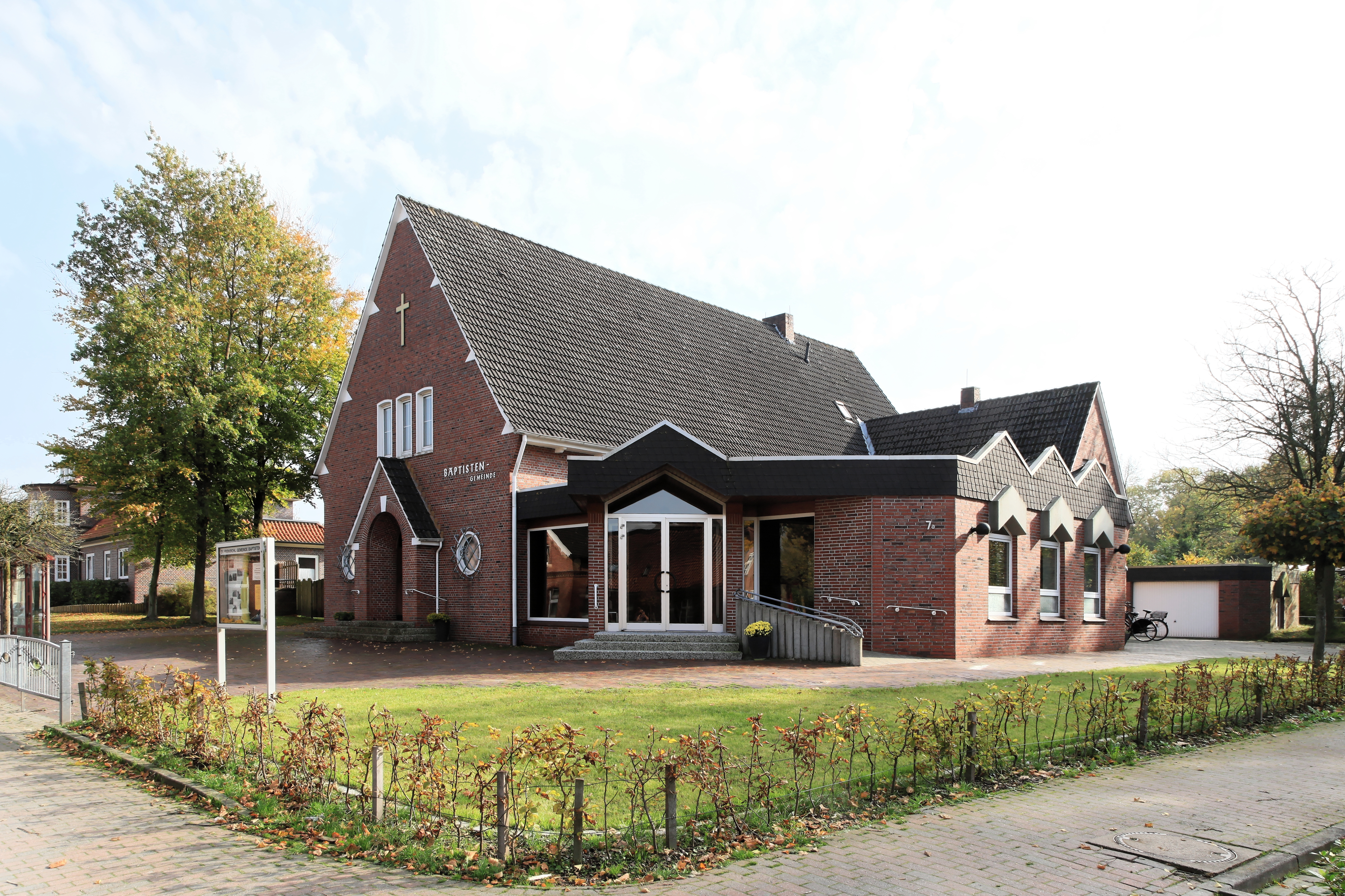 Baptistenkirche, Neue Straße in Weener